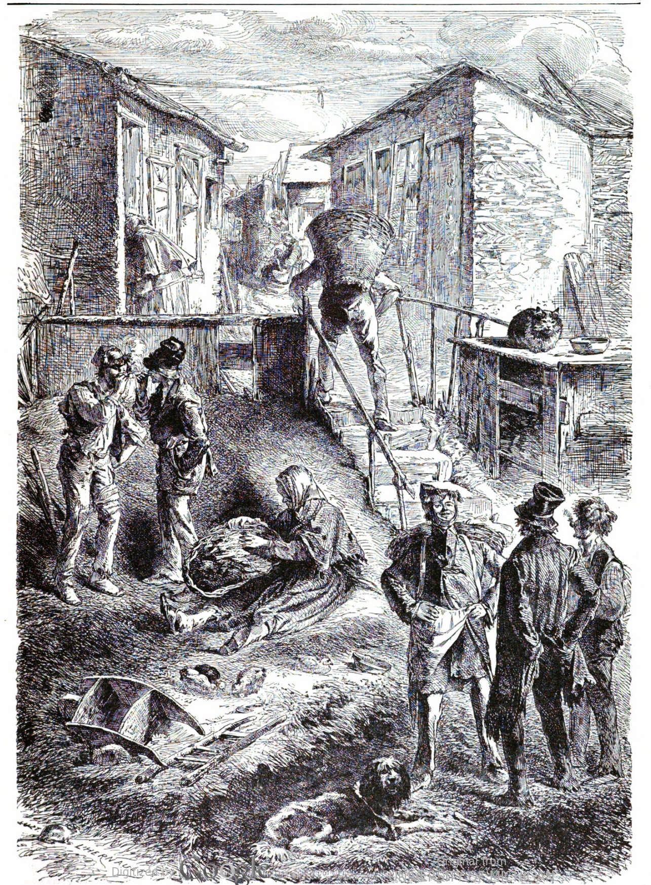 Gravure représentant la Fosse aux Lions, à Paris, par L'Hernault, 1863.